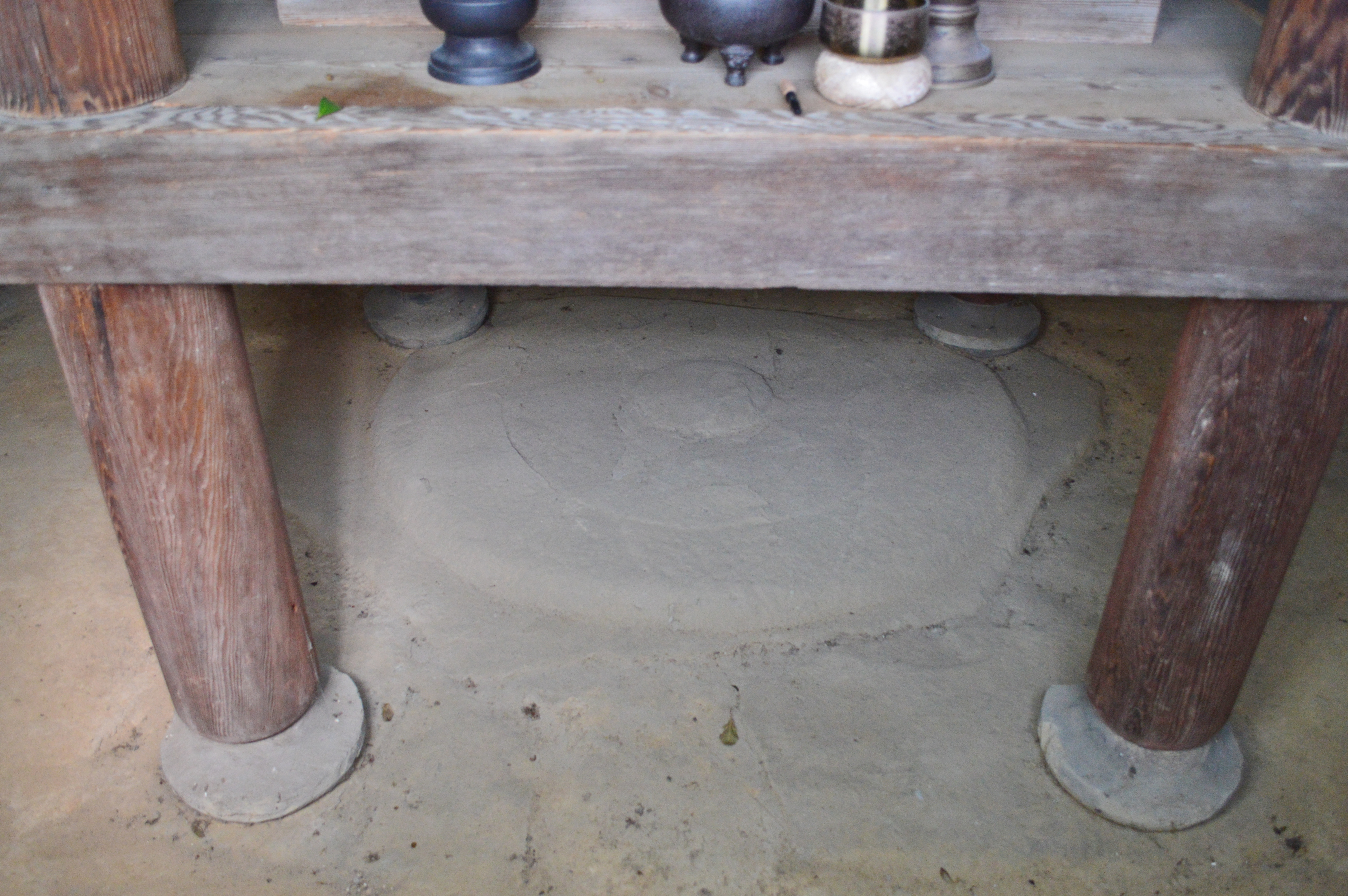 淡路国分寺跡 塔心礎 Nikon D3200